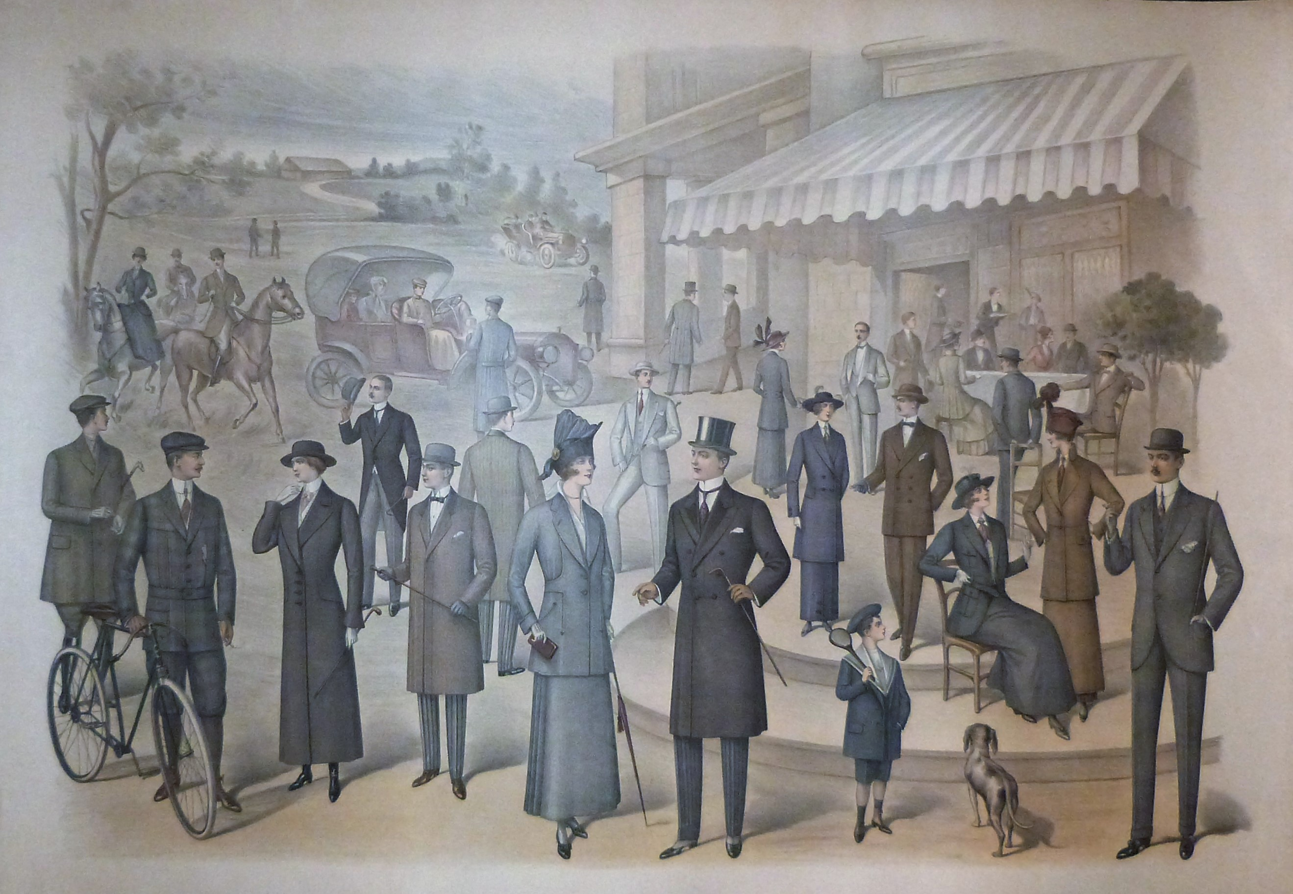 Interessante raffigurazione di abiti maschili e femminili, di gusto e fattura liberty.